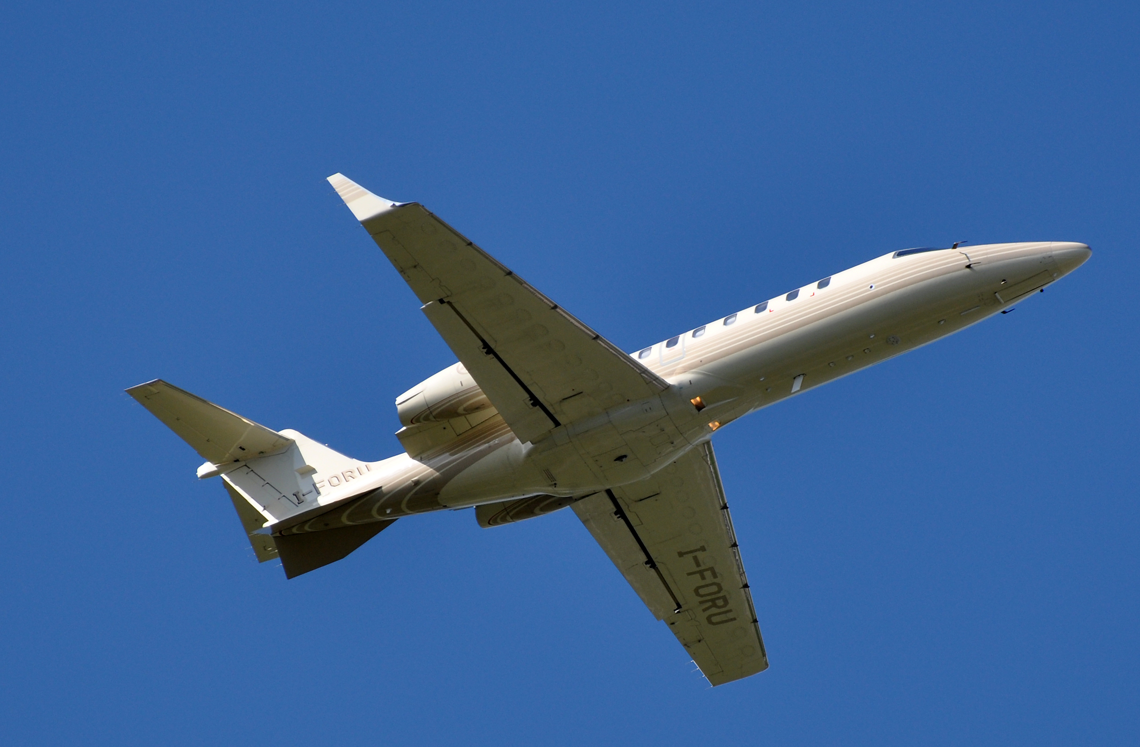 MSN 036 Learjet 45 AIR 4 DUB